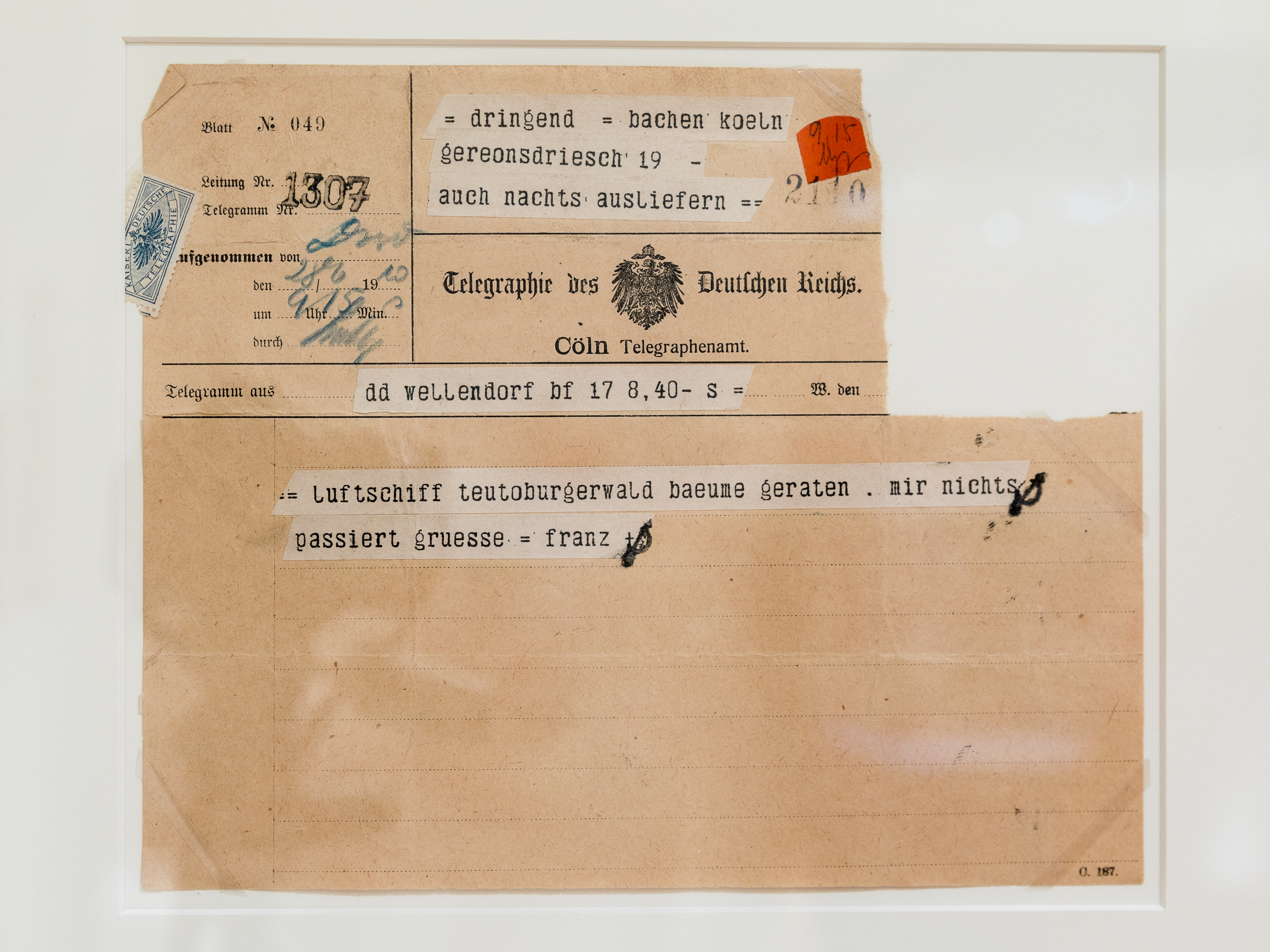 Bretter, die die Welt bedeuten. Spielend durch 2000 Jahre Köln Foto: Telegramm von Franz Xaver Bachem. Bahnhof Wellendorf. 28.06.1910. Papier, Druck und Schrift. Leigabe Stiftung Rheinisch-Westfälisches Wirtschaftsarchiv zu Köln